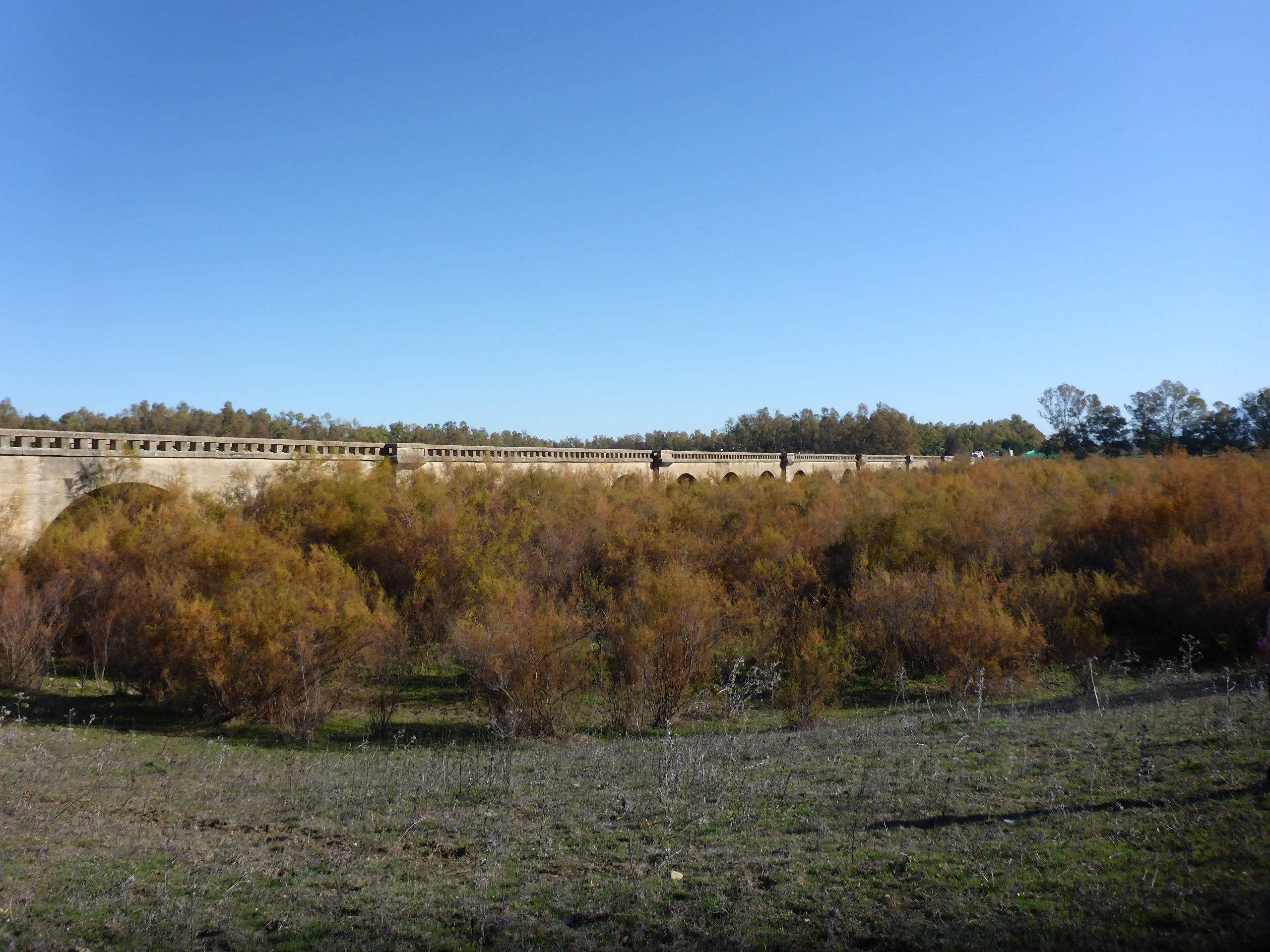 Vía Verde de la Sierra (tramo Bornos-Coto de Bornos). España